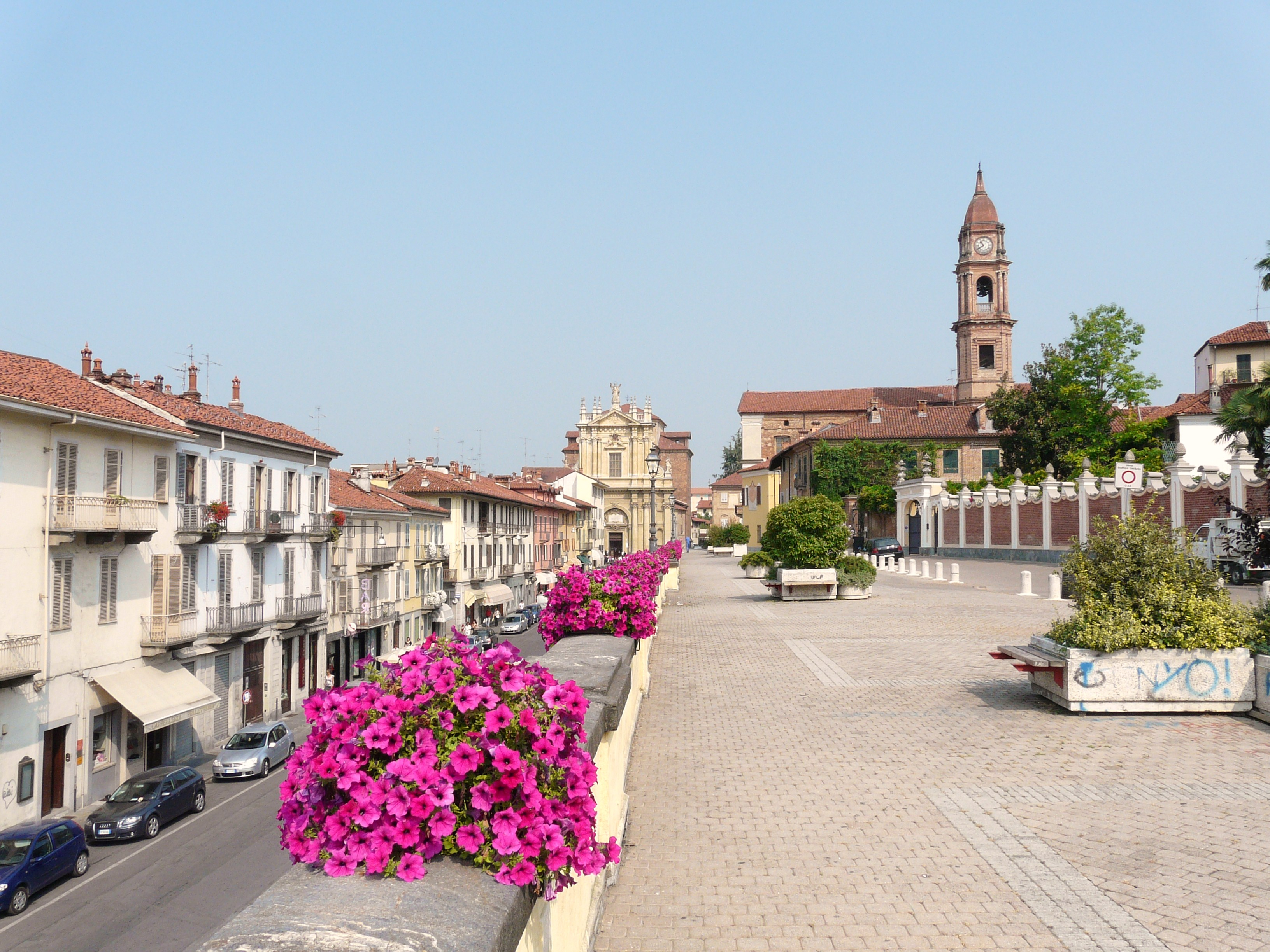 Panorama, Bra, Piemonte, Italia